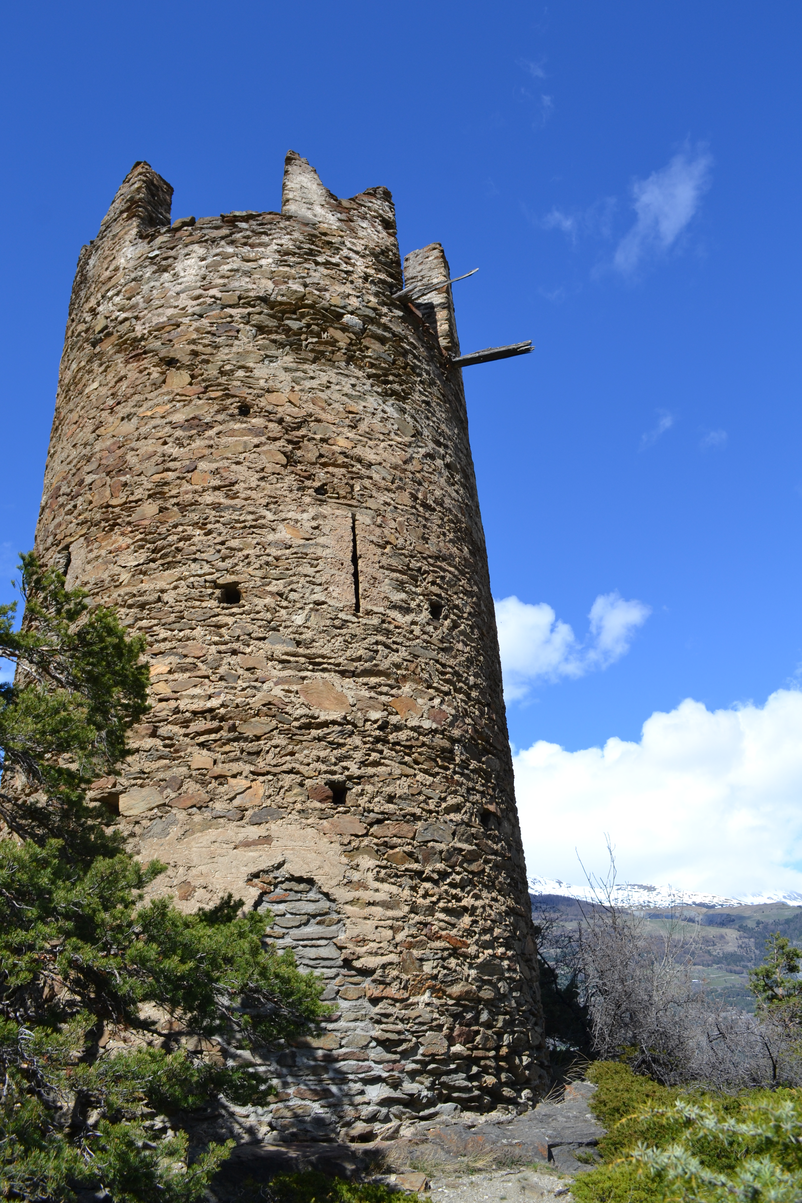 Andrea Vallet, mio scatto, Castello di Montmayeur